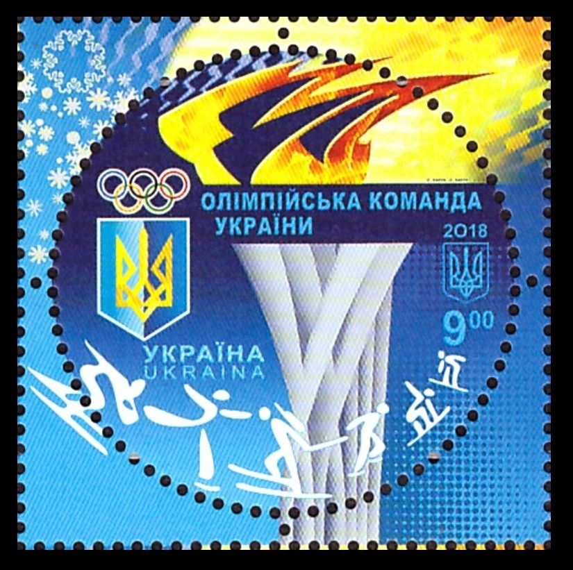 Марка Украины. 2018. Олимпийская сборная Украины.